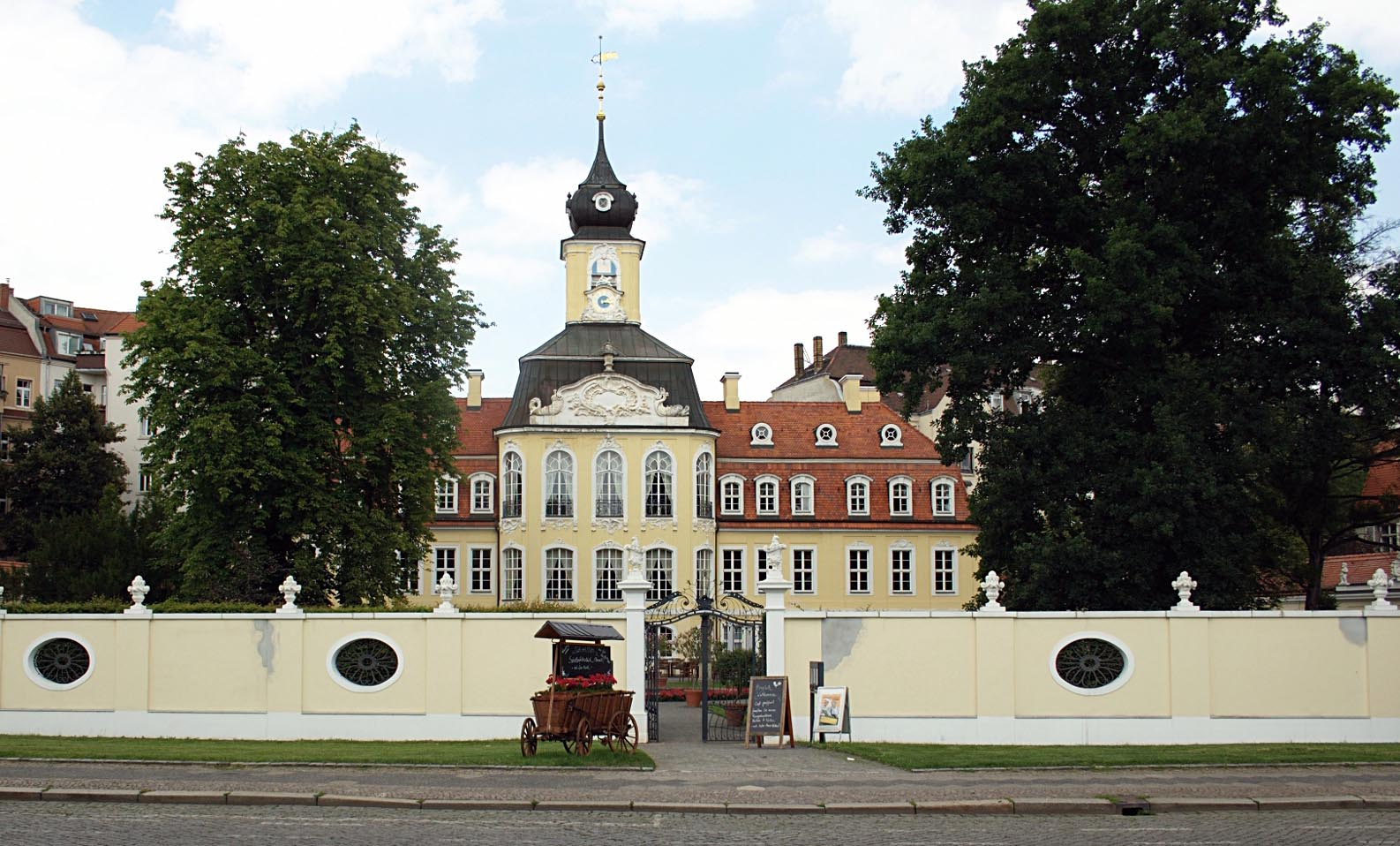 Gohliser Schlösschen in Leipzig